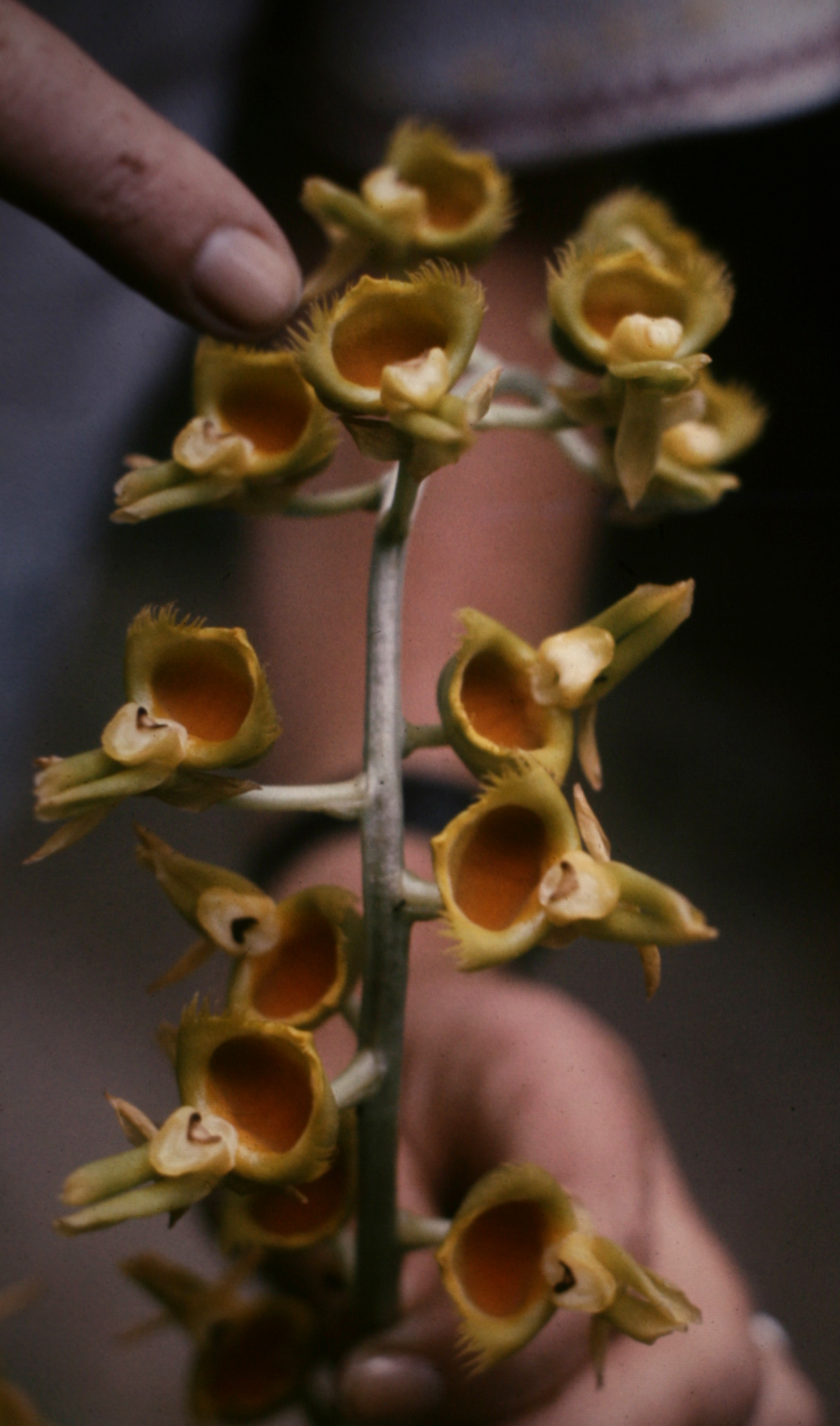 Catasetum discolor, male inflorescence, Suriname.